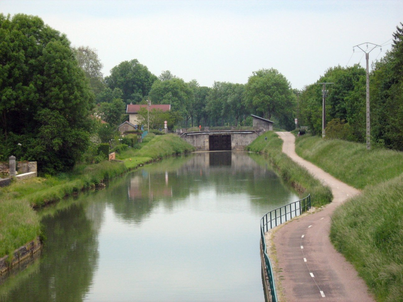 Schleuse 9 in Rolampont, am Canal de la Marne à la Saône